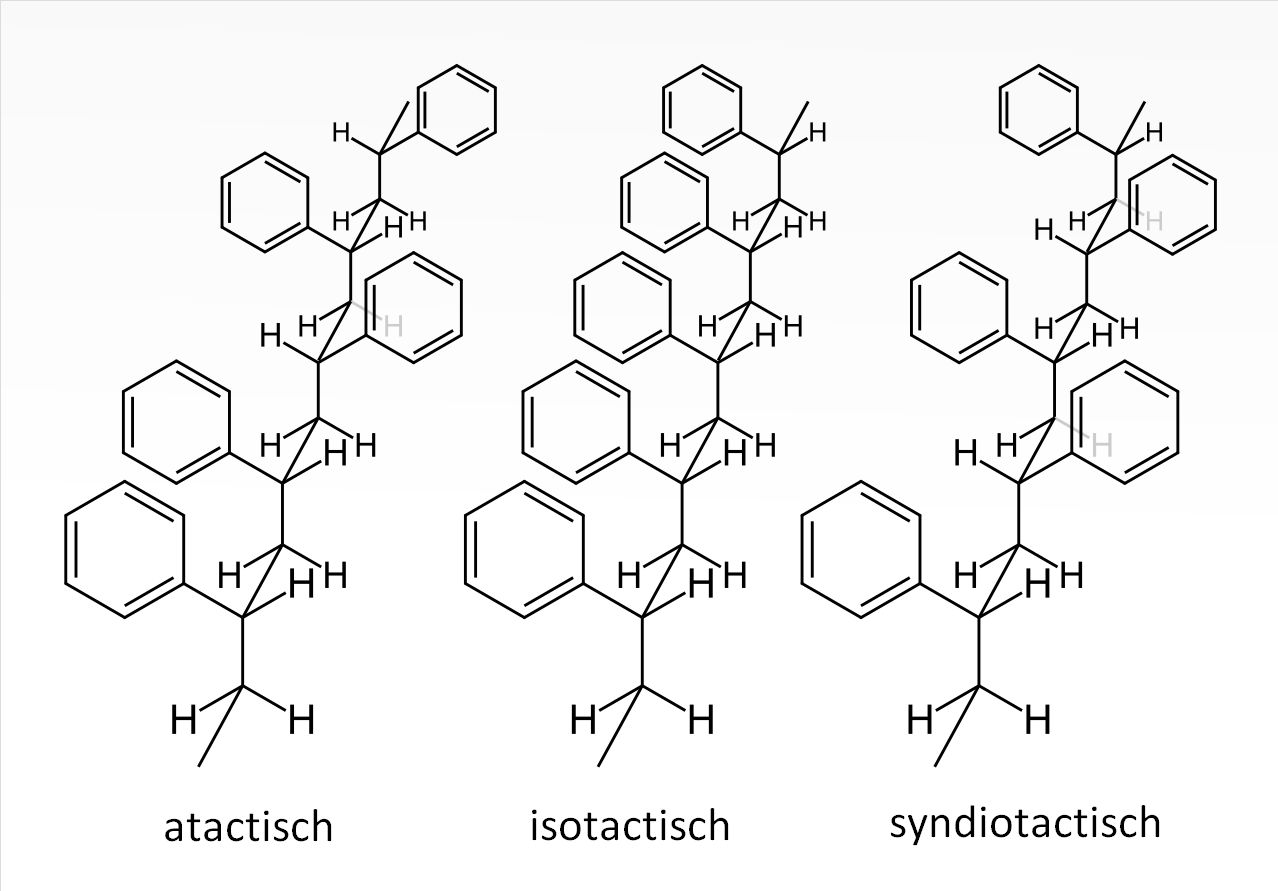 Het bestand heeft als doel om in het artikel Tacticiteit opgenomen te worden